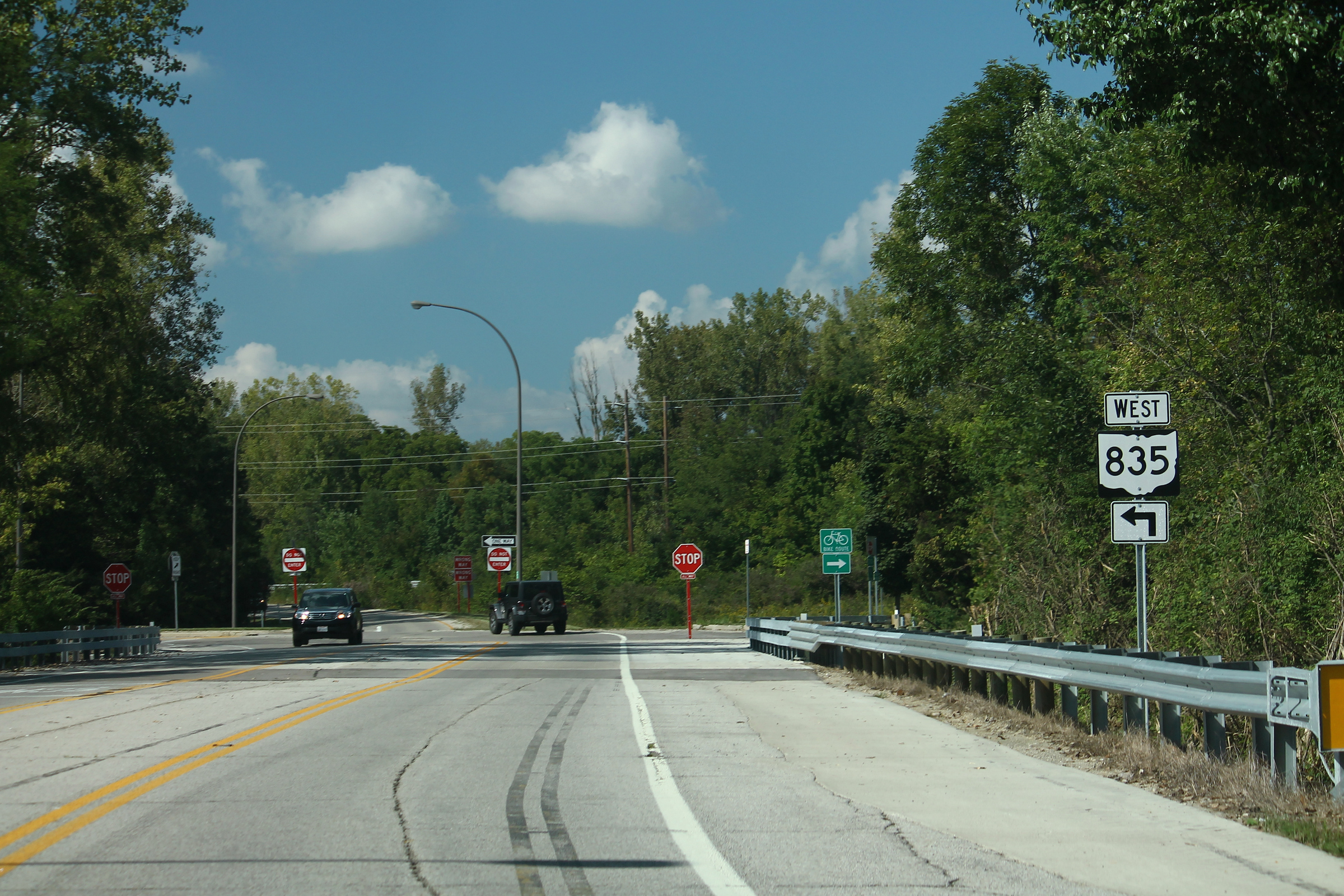 OH835 West Sign